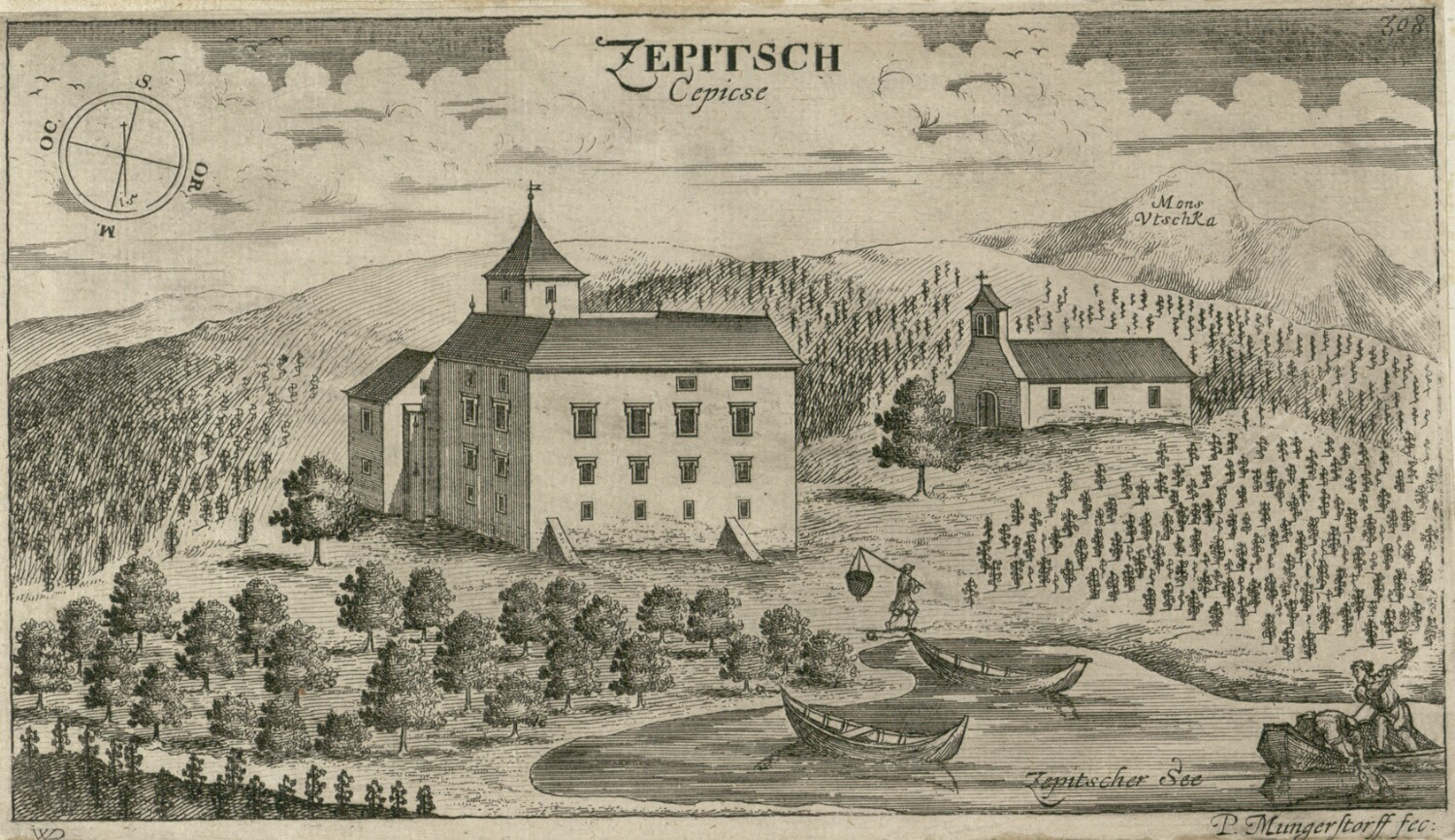 Čepić